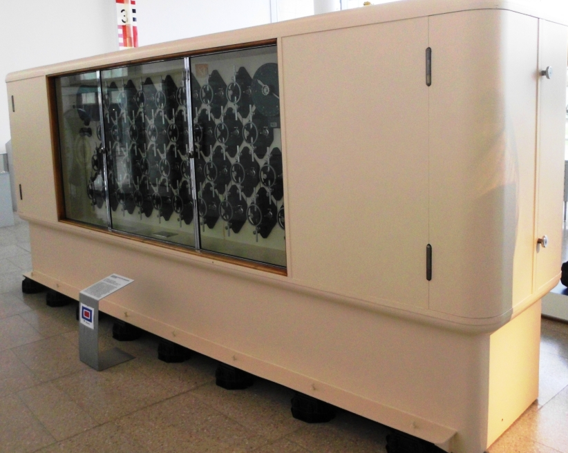 Gezeitenrechenmaschine der DDR